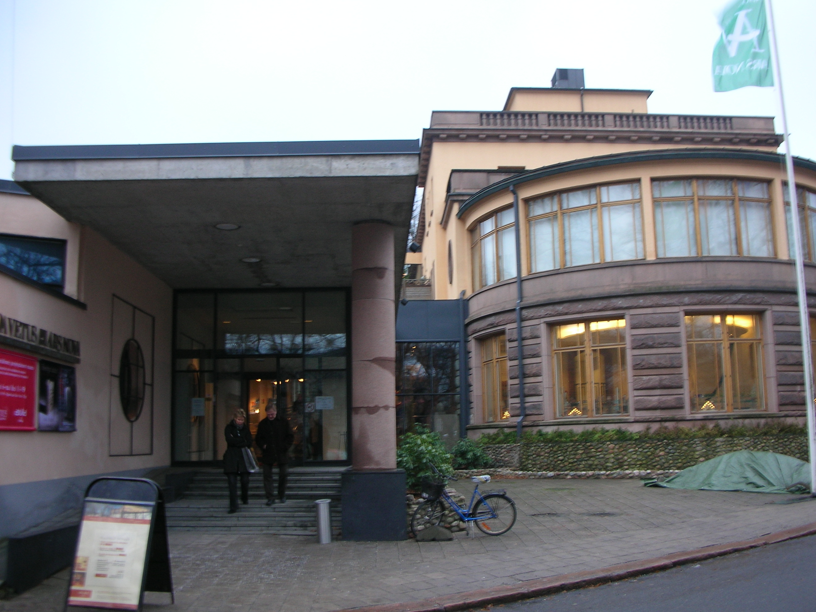 Aboa Vetus & Ars Nova